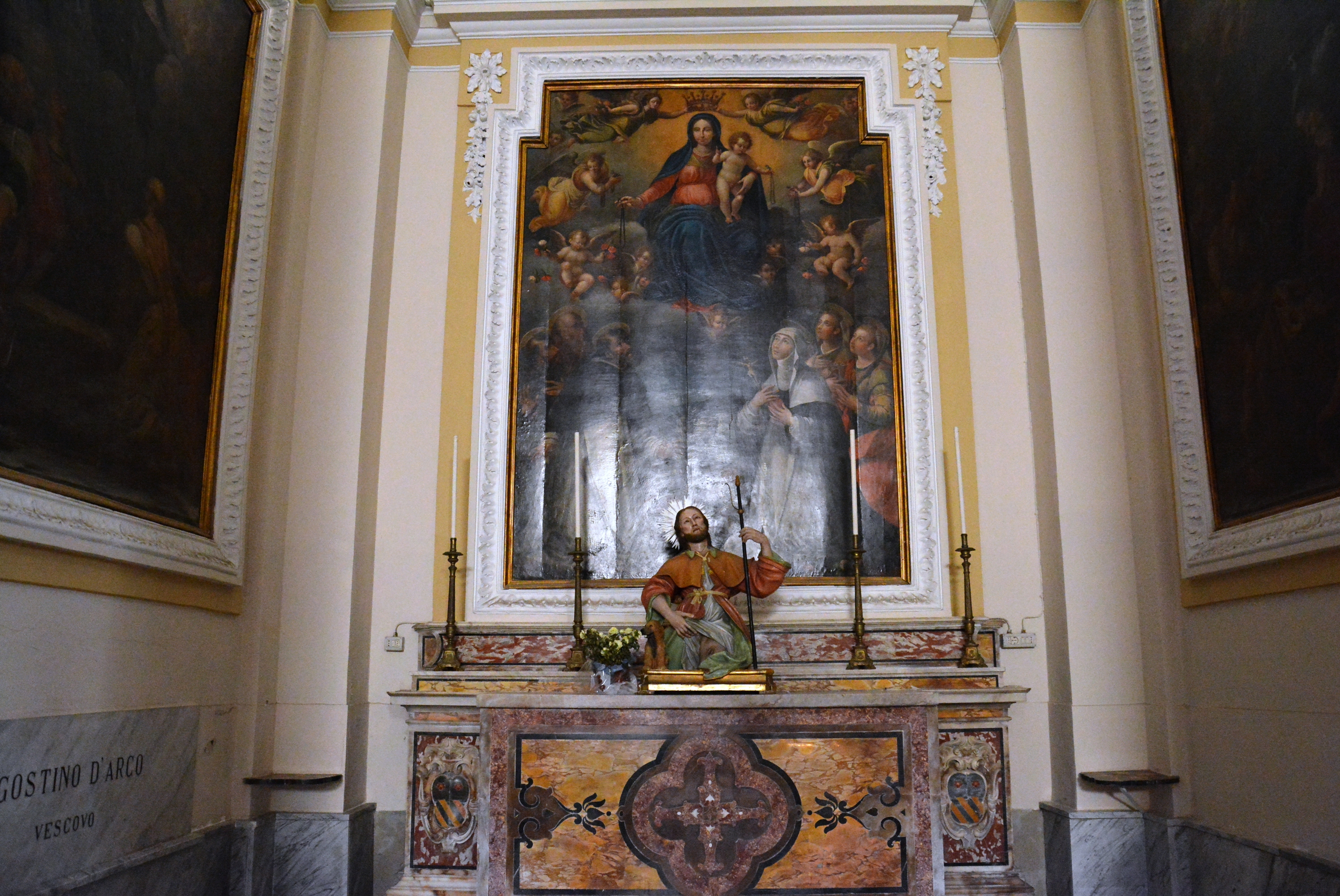 Cattedrale di Maria Santissima Assunta a Castellamma di Stabia